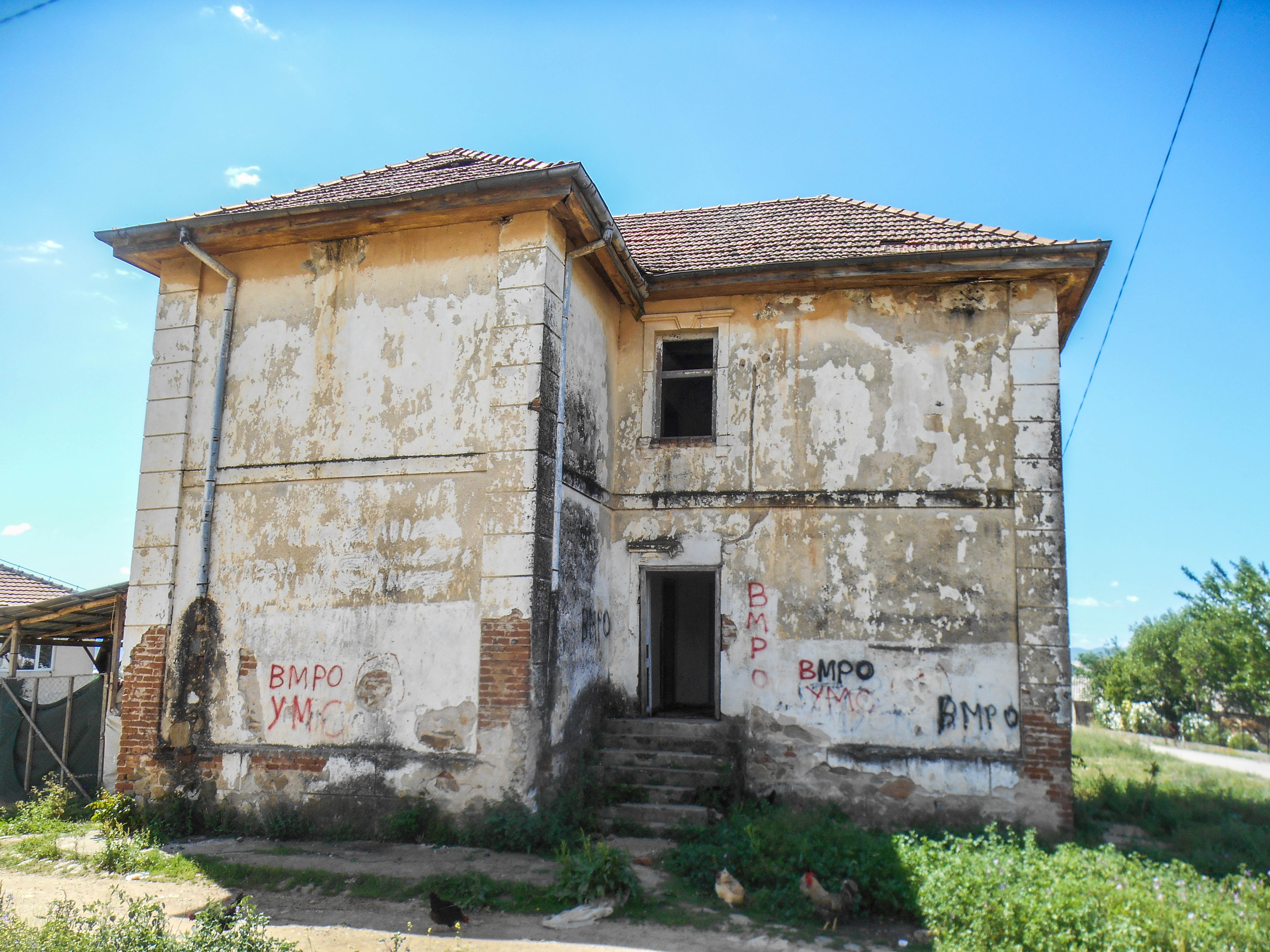 Поранешно училиште во Доброшинци